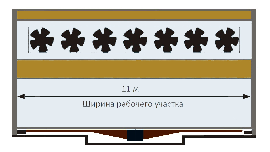 Поперечный разрез Ландшафтной аэродинамической трубы